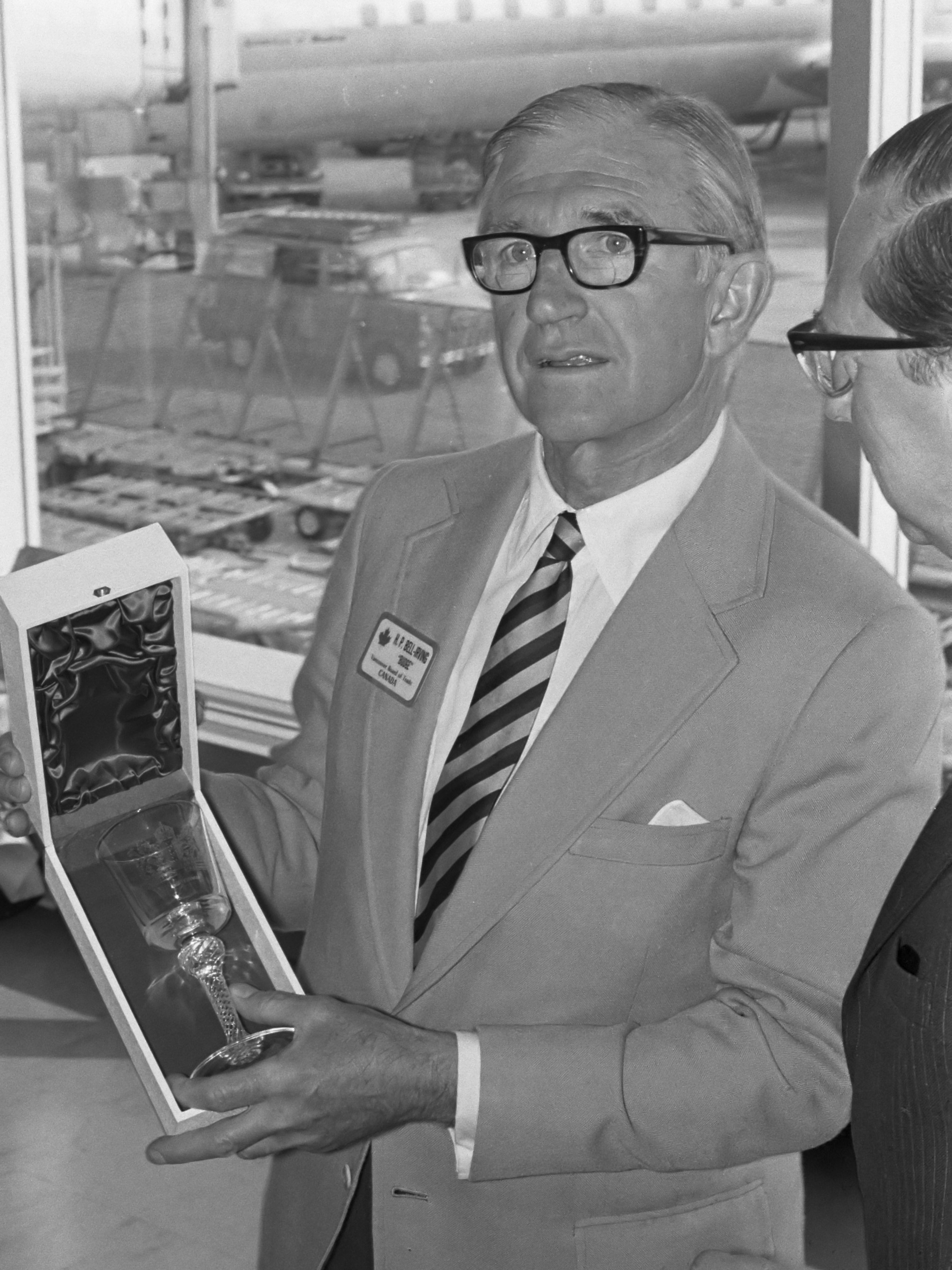 Luitenant Kolonel Bell-Irving op Schiphol 19 april 1974